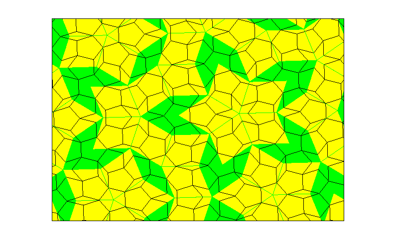 Pavage de Penrose P1, dit 'pentagonal', trace en noir sur fond jaune et vert d'un pavage de type P3